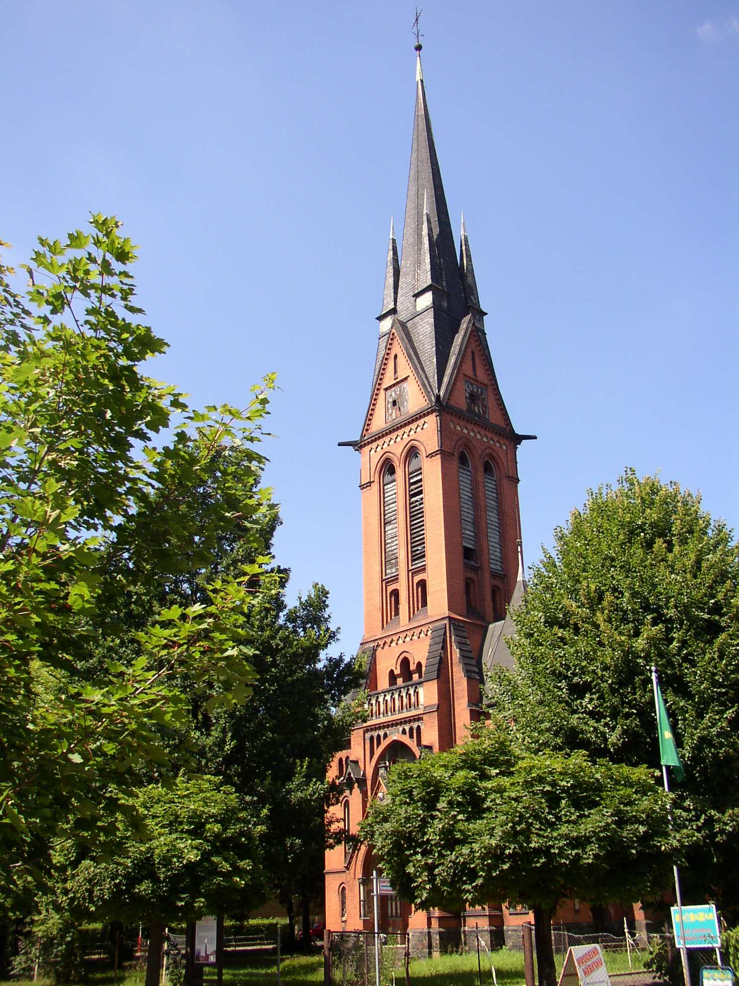 Evangelický kostel, Varnsdorf, okres Děčín, Česká republika